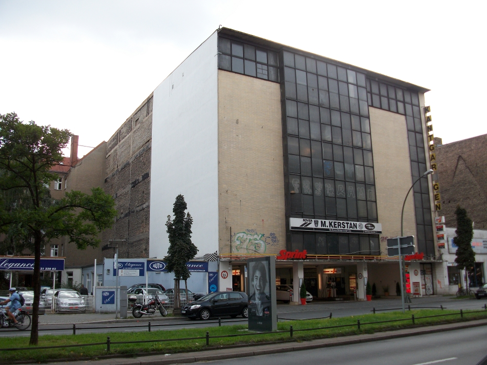 Kant-Garage, Kantstraße 126-127